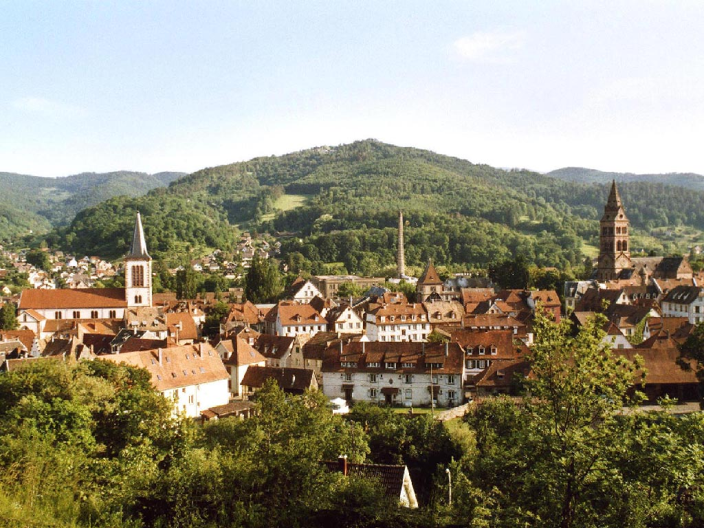 Munster (vue générale)